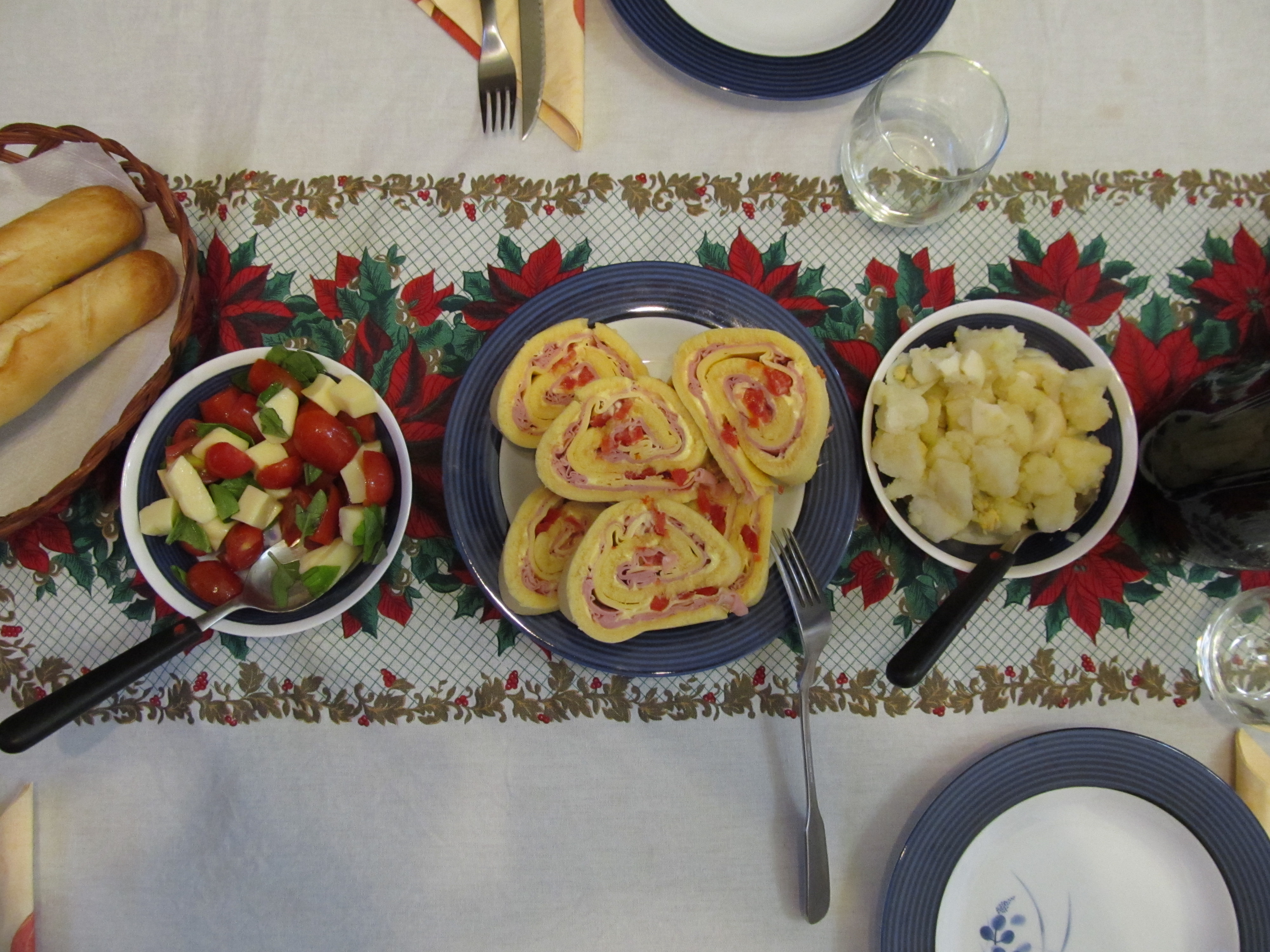 Comida navideña Argentina